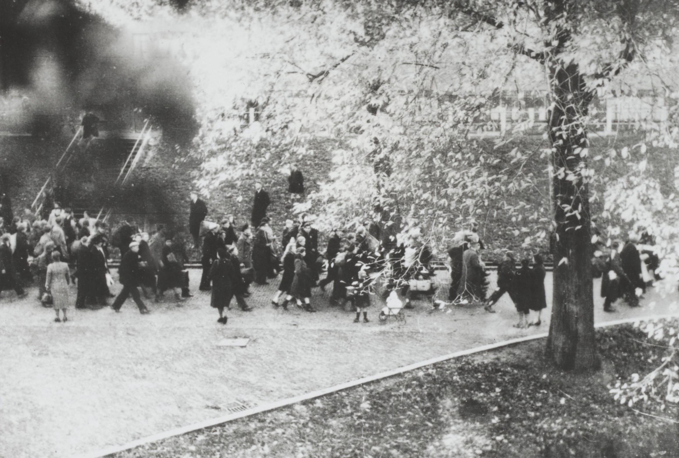 Razzia van Rotterdam. Wegvoeren van gevangenen.